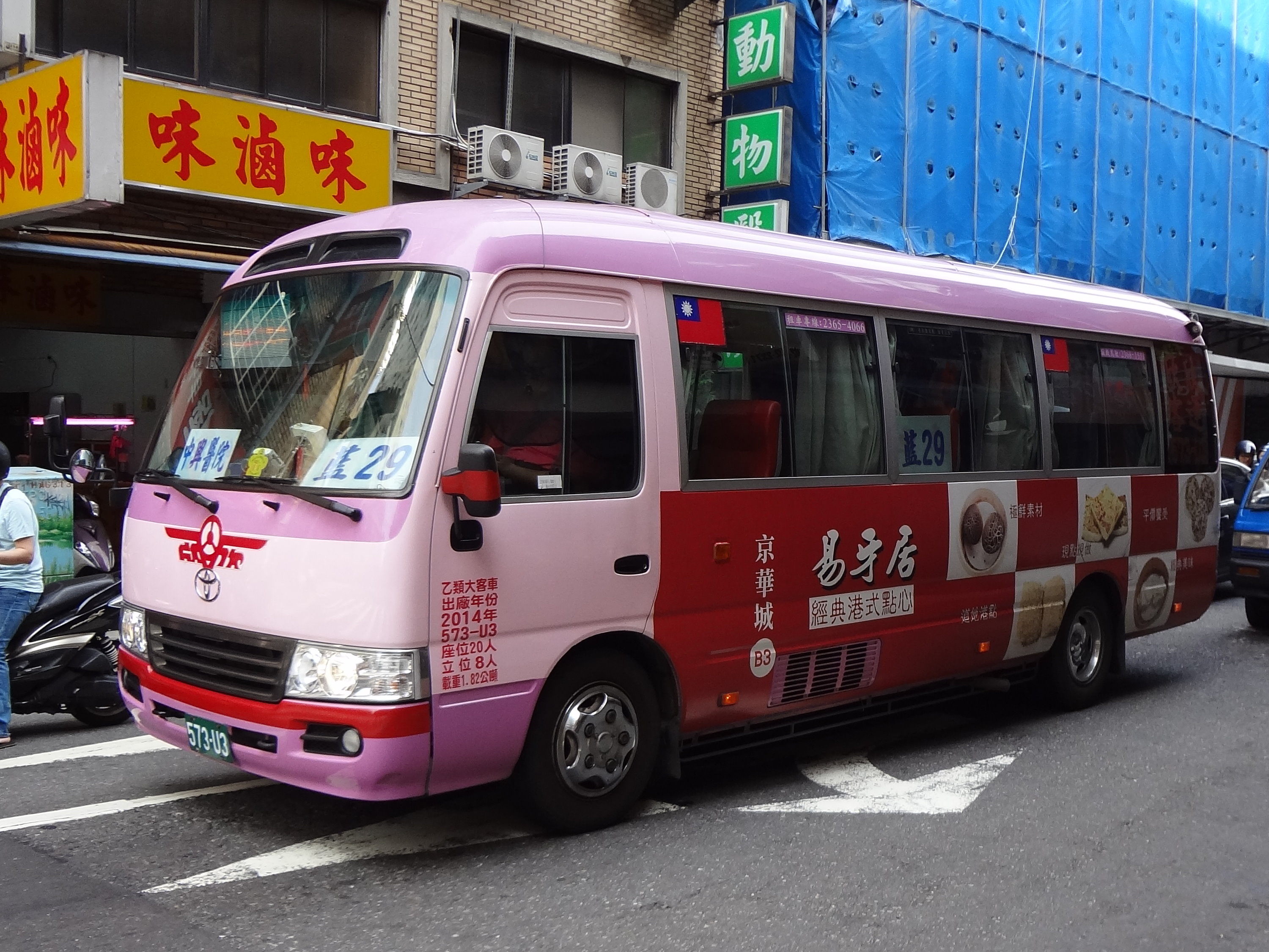 欣欣客運2014年豐田Coaster巴士573-U3。